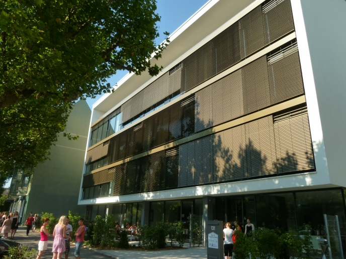 Gebäude des EBZ